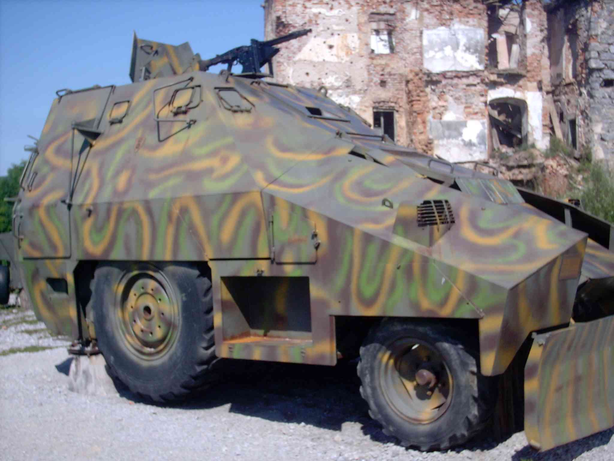 Museum Karlovac (Croatia): umgebauter Traktor